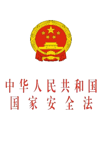 自製仿大陸地區法律封面。上爲PRC國徽，下爲官方字體。